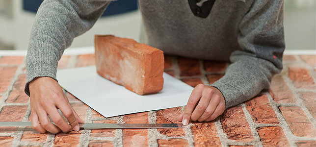 Herstellung von Printtexturen